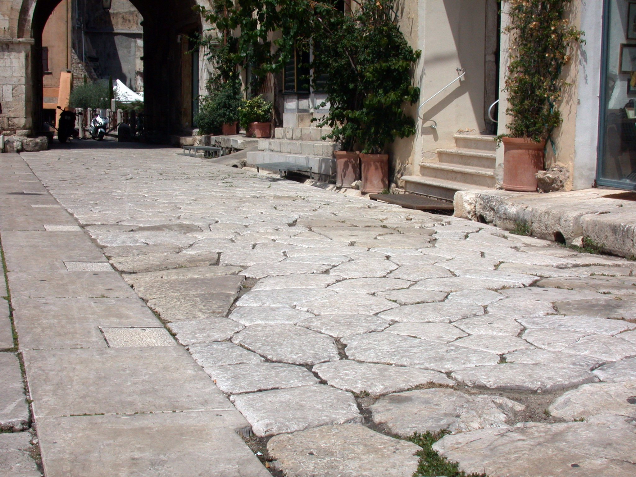 Terracina (provincia di Latina, Lazio, Italia), città alta, Foro Emiliano, tratto del lastricato della via Appia.